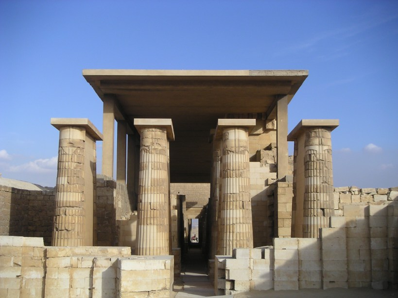 Colonnes du complexe funéraire de Djéser à Saqqarah - IIIe dynastie égyptienne